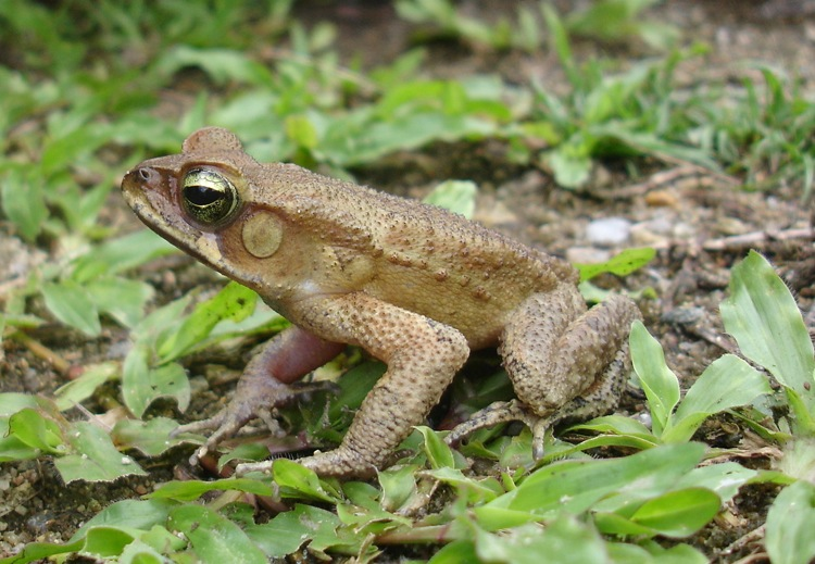 Bufo abei